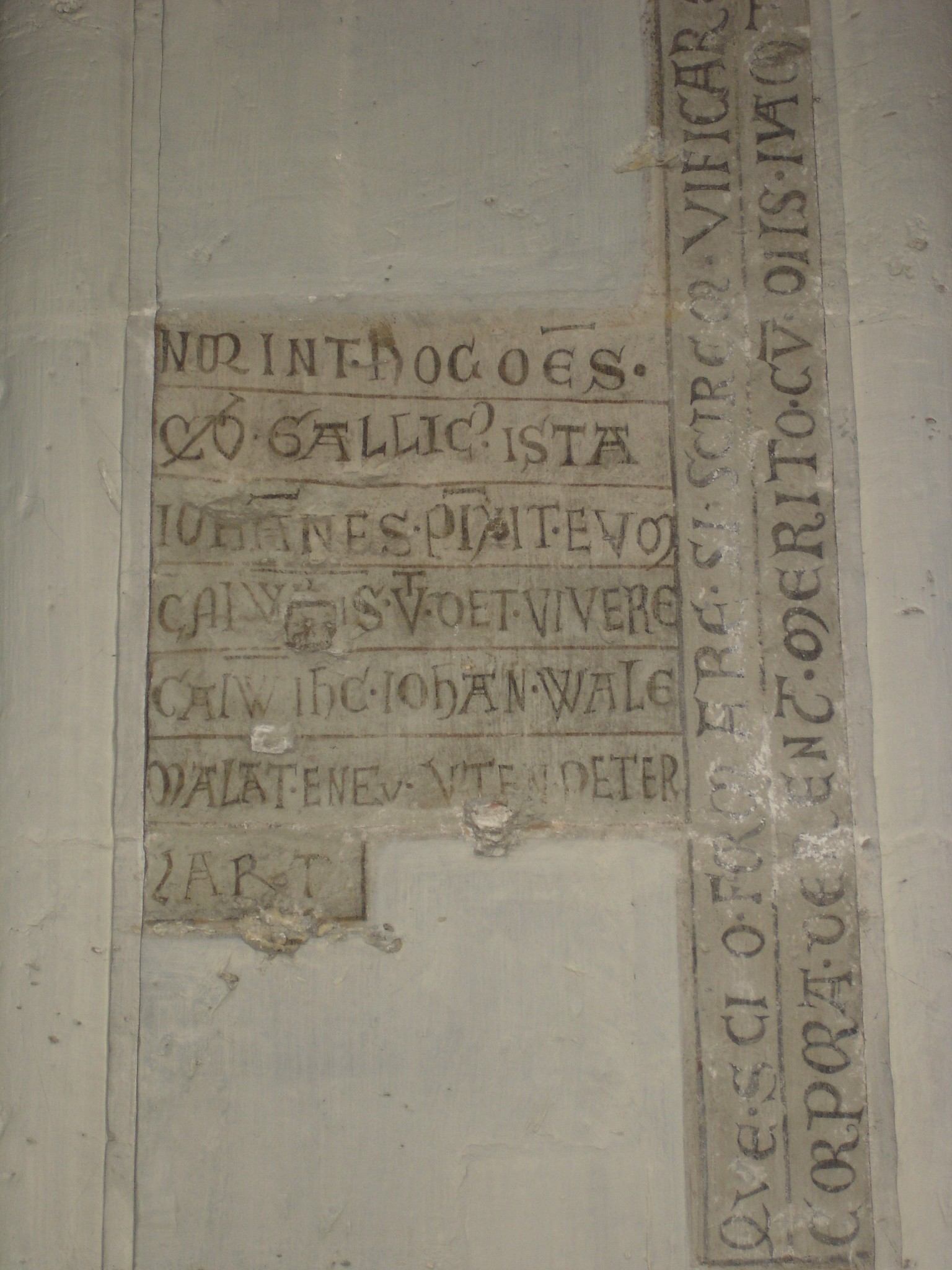 Braunschweiger Dom: Mittelalterliche Malersignatur Johannes Wale